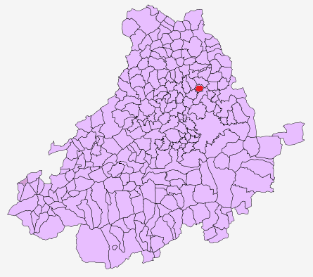 Mapa de Gotarrendura en la provincia de Ávila (España)